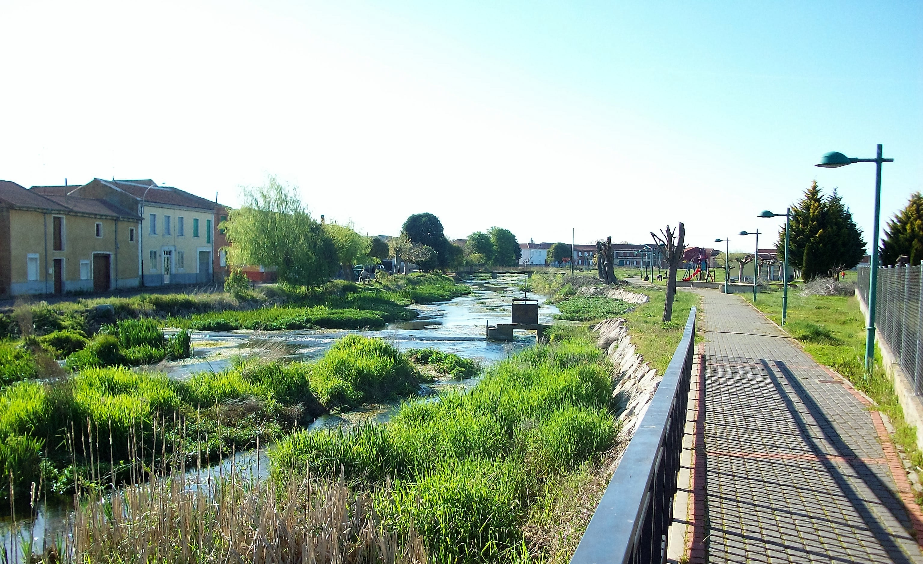 Urbanización pública en el recorrido de Huerga